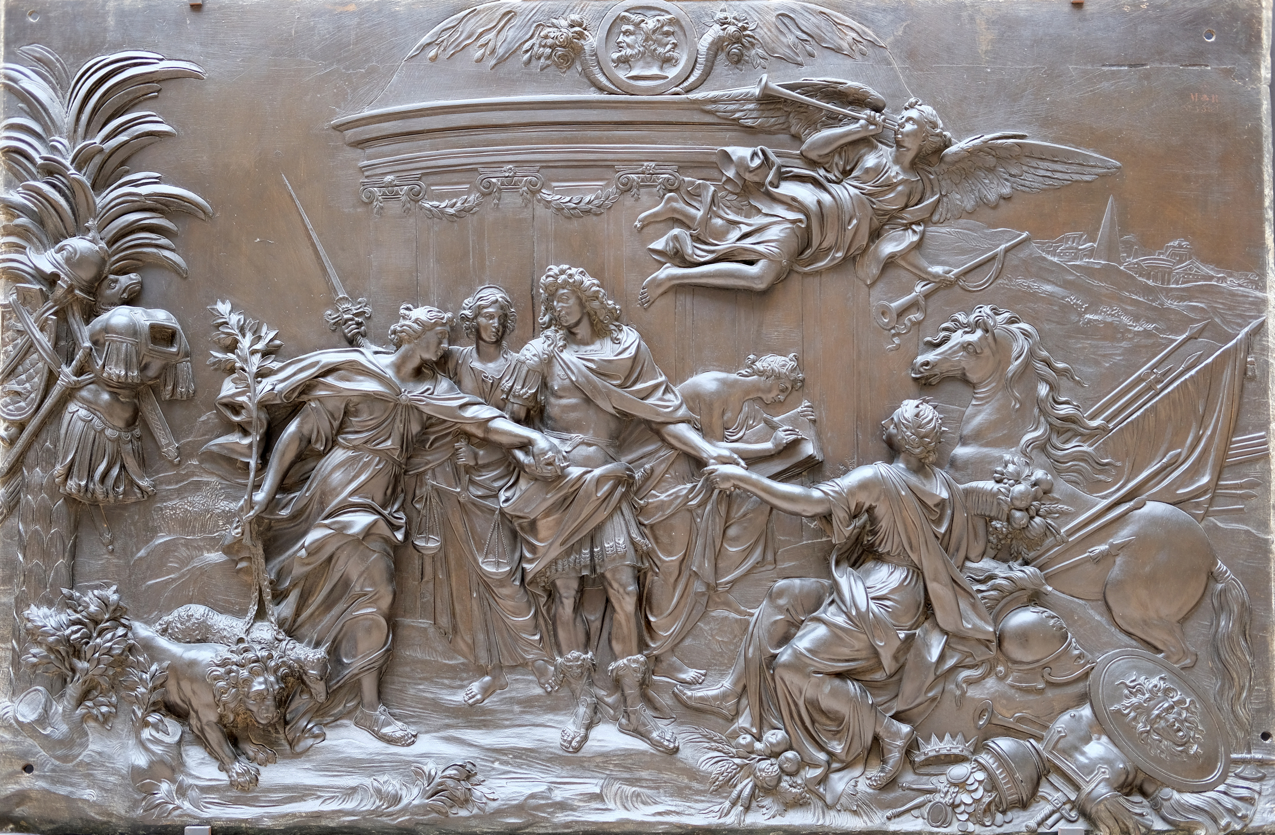 Bas-relief en bronze provenant du piédestal de la statue en bronze de Louis XIV, place des Victoires (Paris). Commémorant la paix en Europe, concrétisée par trois traités signés à Nimègue : avec la Hollande, le 10 août 1678 ; avec l'Espagne, le 17 septembre 1678 ; et avec l'Empire, le 5 février 1679. Le Brandebourg signa la paix le 30 juin 1679 à Saint-Germain. L'allégorie figure le roi Louis XIV amenant par la main la Paix (qui tient en laisse un lion et un agneau) à l'Europe, figure assise accompagnée d'un cheval. L'allégorie de l'Histoire écrit la gloire du roi ; la Renommée sonne de la trompette..